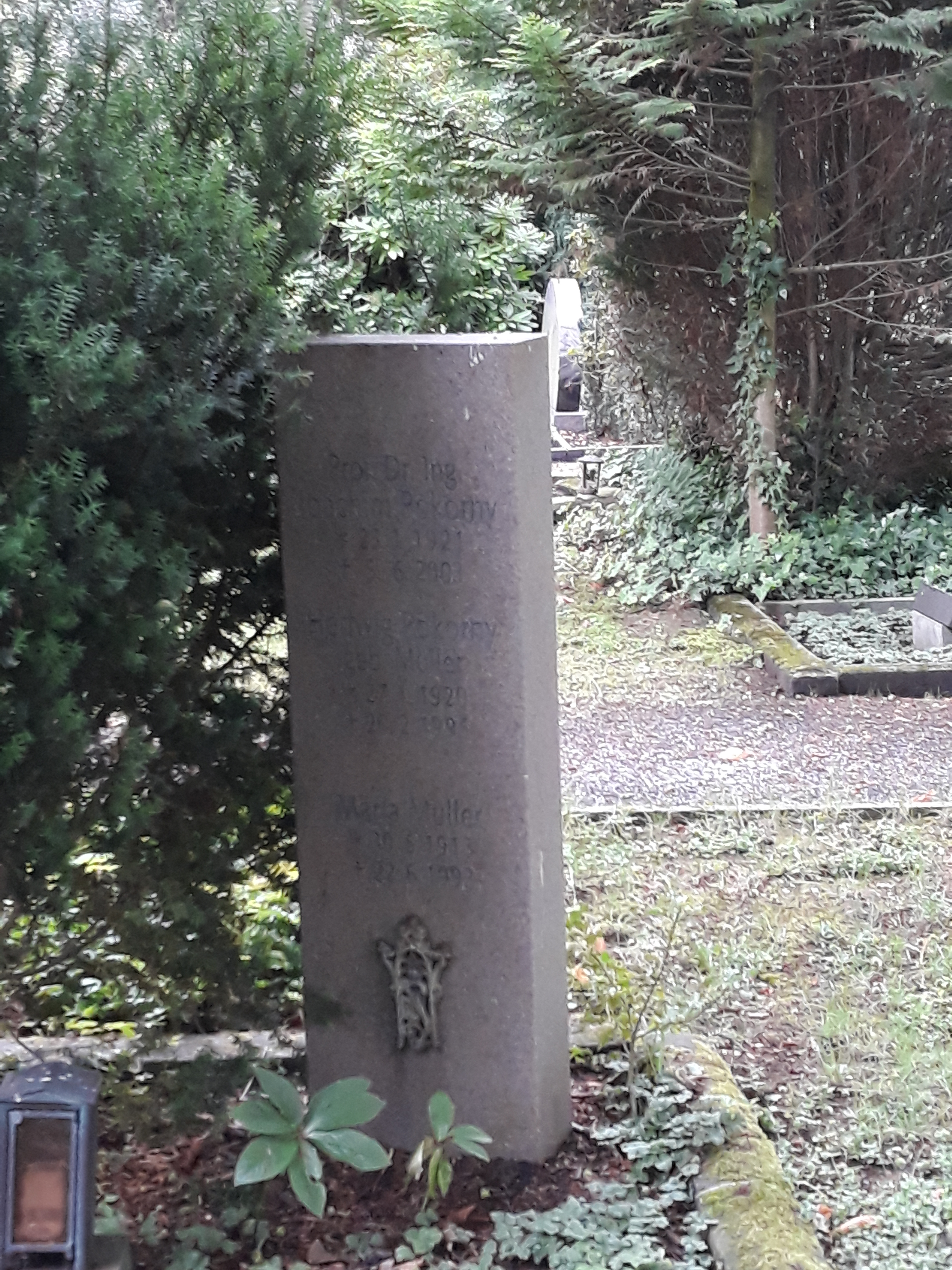 Das Grab des deutschen Maschinenbauingenieurs und schlesichen Heimatforschers Joachim Pokorny im Familiengrab auf dem Osthofenfriedhof in Soest.